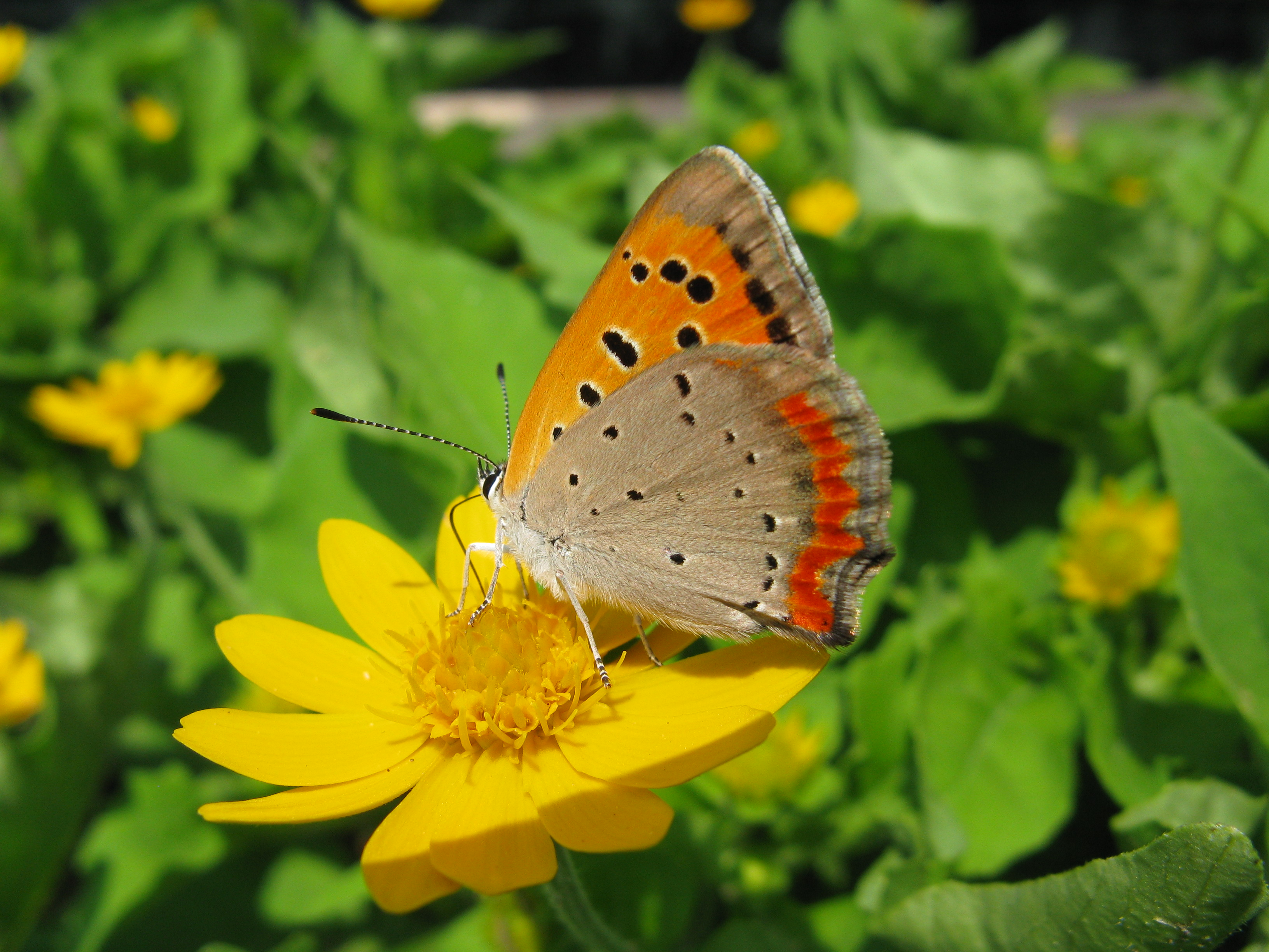 Scientific name Lycaena phlaeas daimio